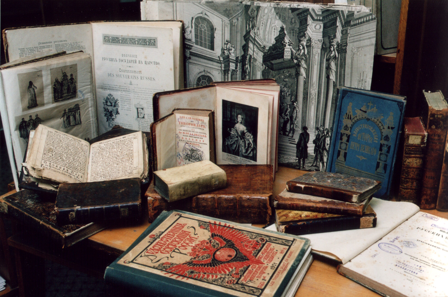 Книжные памятники, редкие книги и рукописи из собрания редкого фонда Научной библиотеки Курского государственного университета